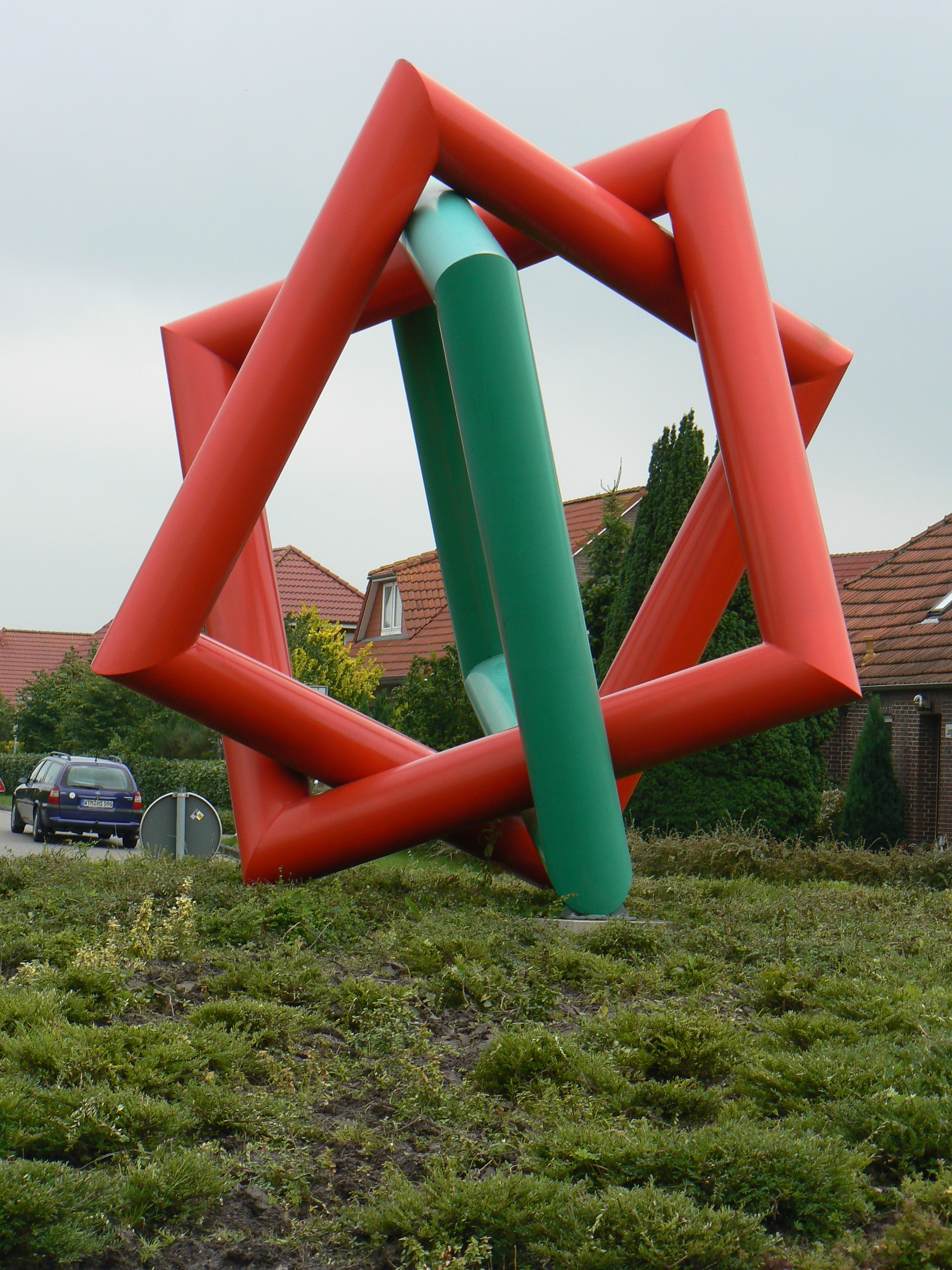 sculpture Wittmund/Germany